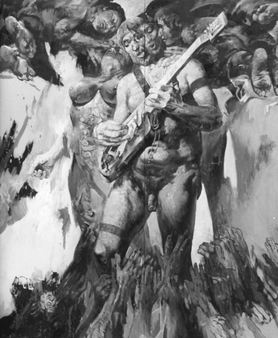 Leipzig, "Neues Gewandhaus", Tafelbild ADN-ZB Brubitzsch-8-10-71-Str-wr Neues Gewandhaus Leipzig Tafelbild von Prof. Willi Sitte (1981) "Rock-Sänger" (Reproduktion) ausgestellt im neuen Gewandhaus ADN-Zentralbild Berlin-DDR